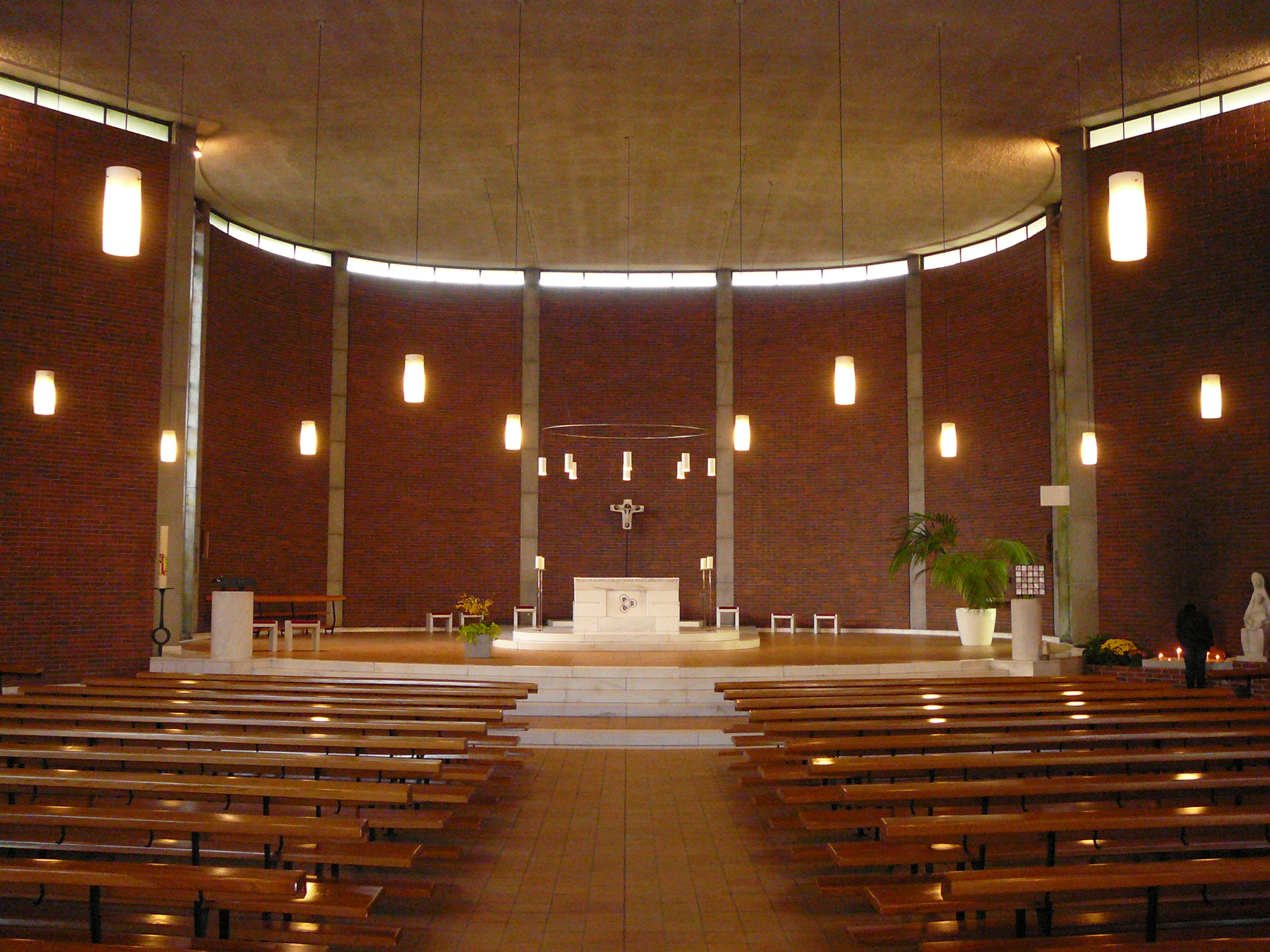 Römisch-katholische Pfarrkirche St. Laurentius Winterthur-Wülflingen, Altarraum